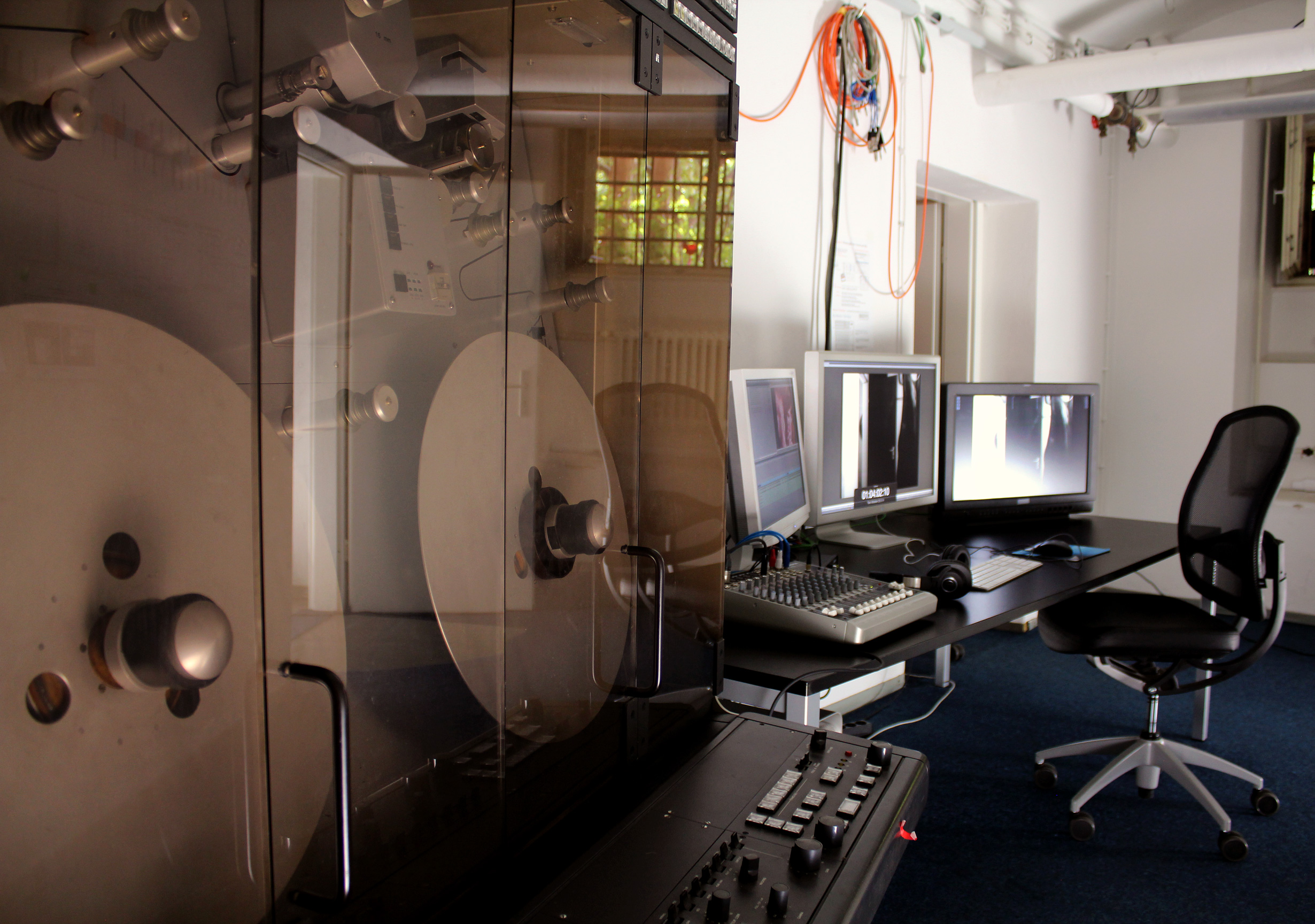 Medienwerkstatt Berlin im Künstlerhaus Bethanien in Berlin-Kreuzberg, einer von 5 Arbeitsplätzen.